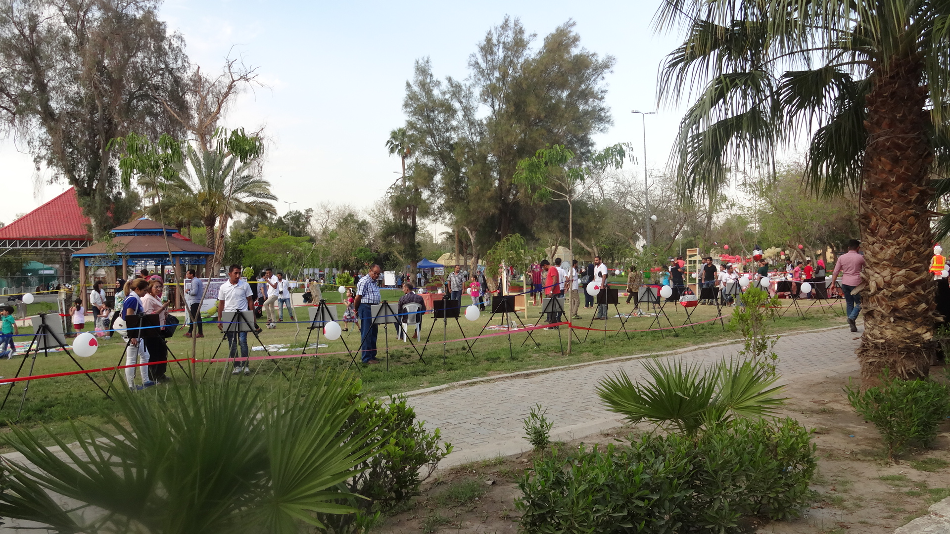 صورة معرض للرسوم في متنزه الزوراء في بغداد عاصمة العراق خلال مهرجان الزهور